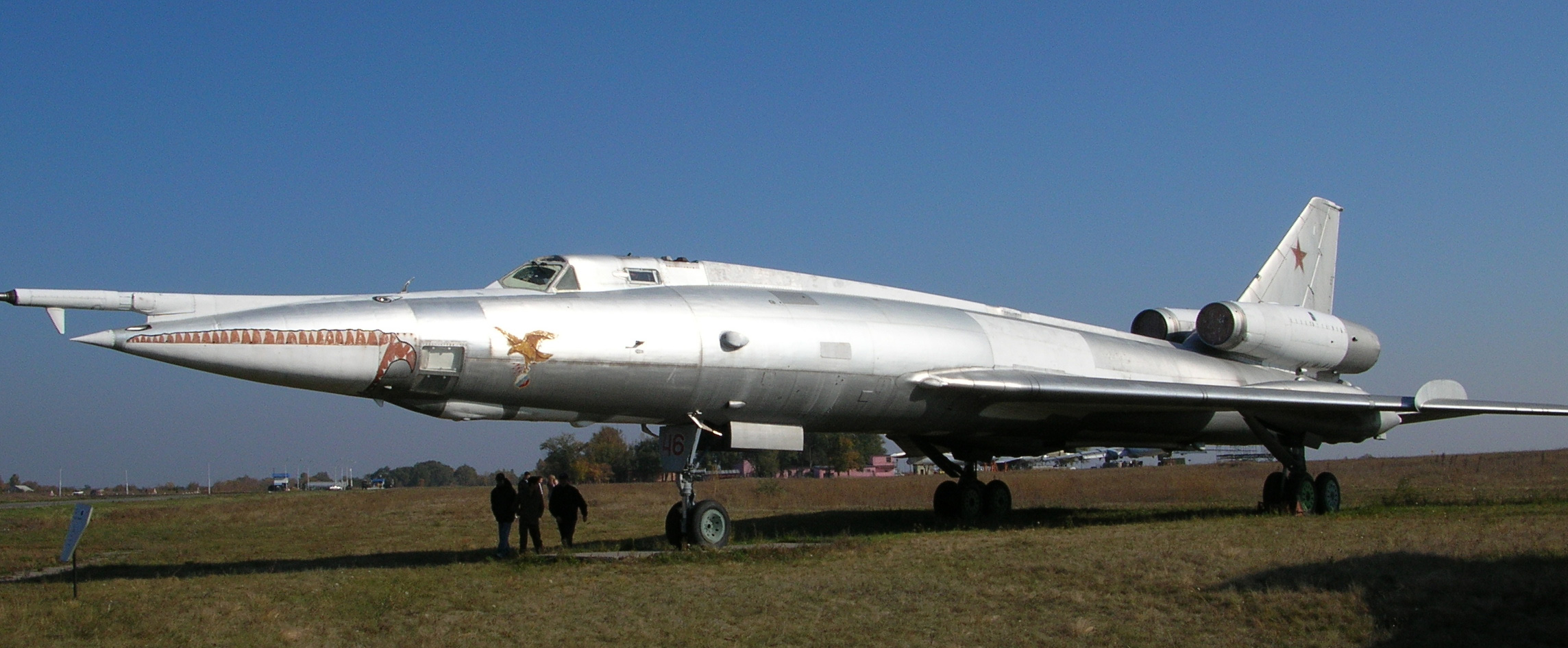 Самолёт-постановщик помех Ту-22ПД в музее дальней авиации на авиабазе Энгельс, Саратовская область.